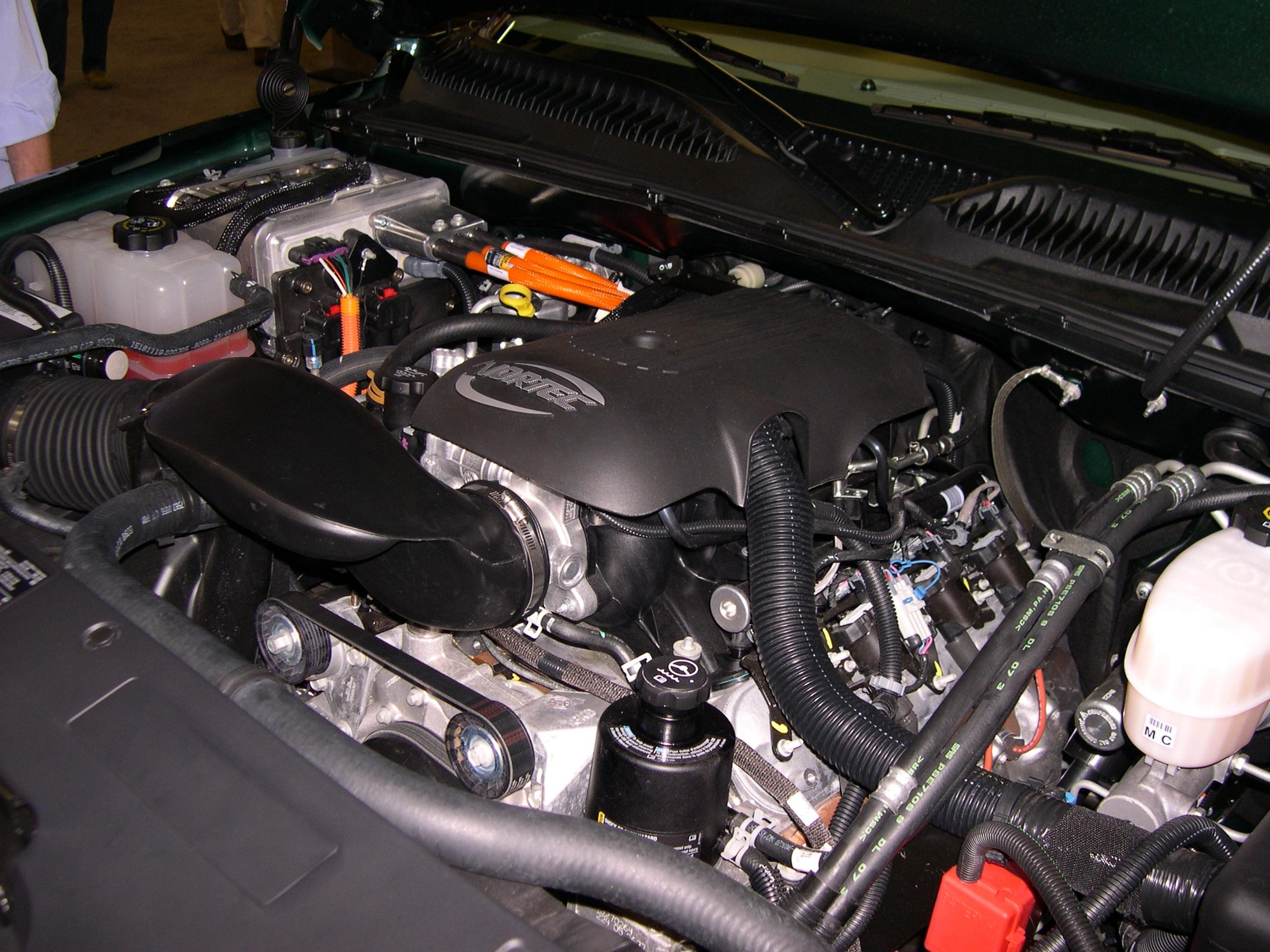 2006 GMC Sierra Hybrid engine